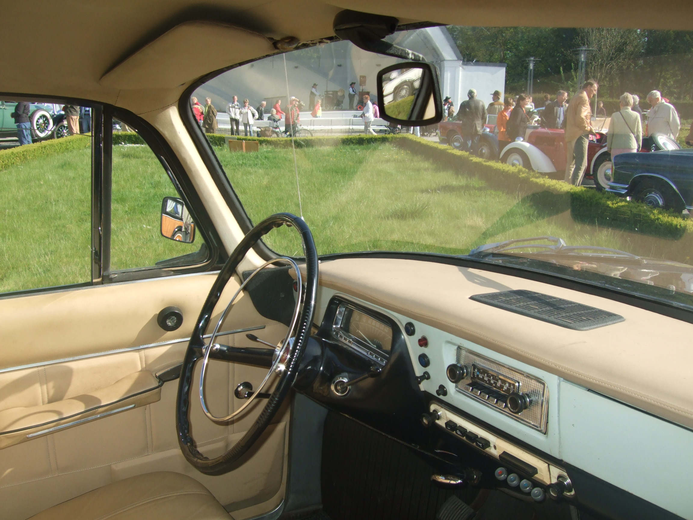 Fahrercockpit eines Tatra T603